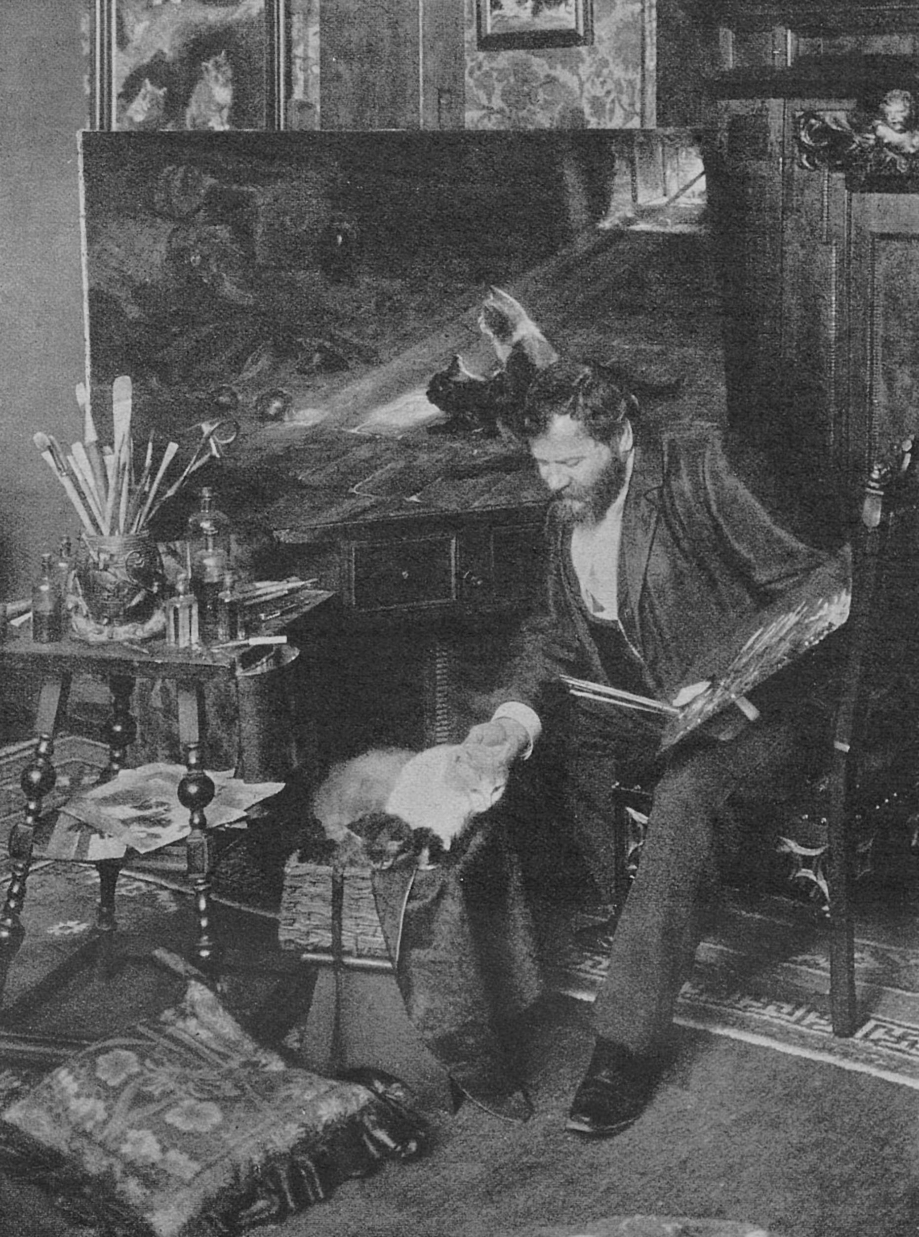 Professor Julius Adam, genannt Katzen-Adam wegen seiner Vorliebe für die Schilderung dieser Tiere, einer der besten Diez-Schüler, geb. am 18. Mai 1852 in München, ist am 23. September 1913 gestorben.